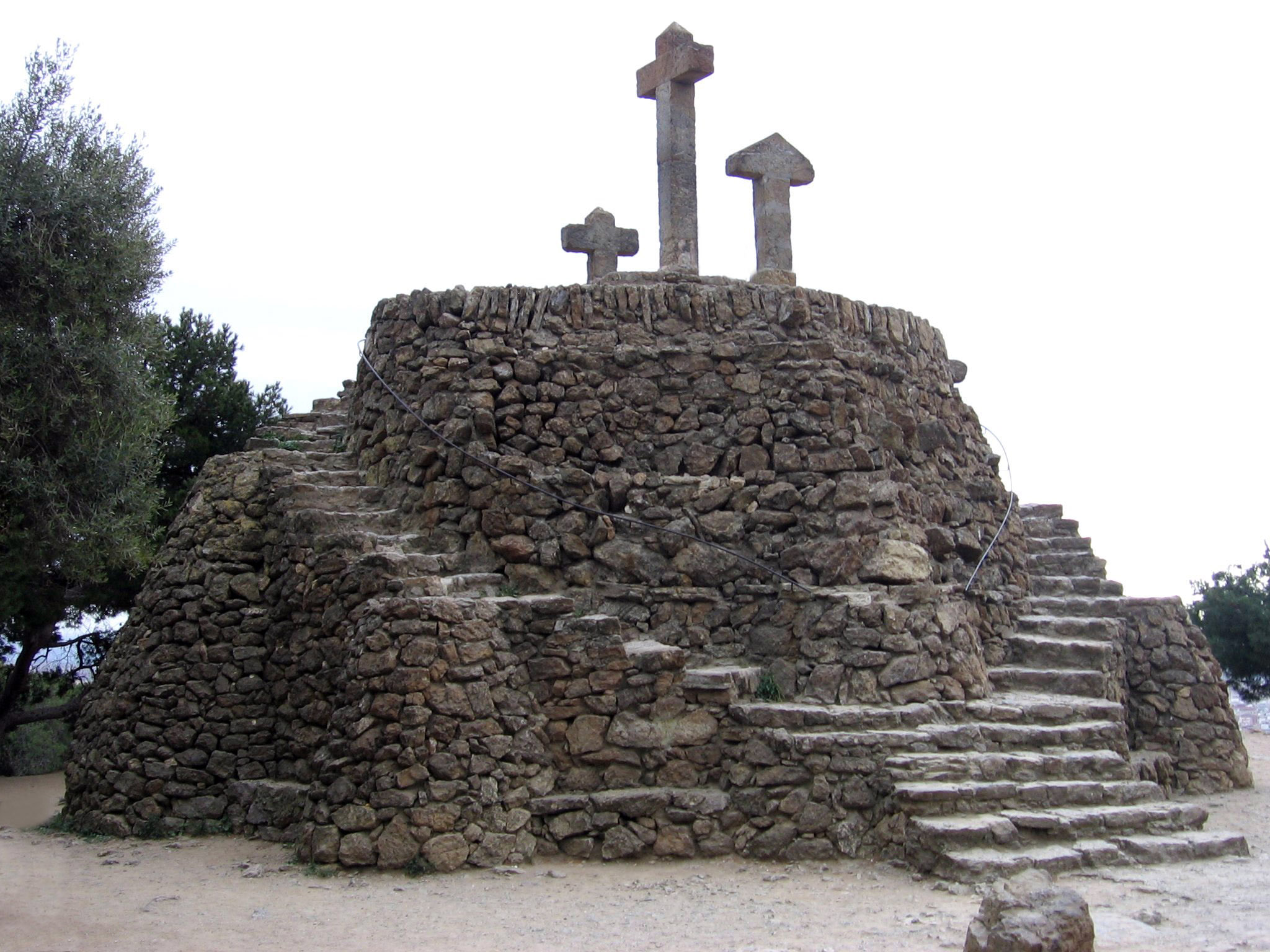 Park Güell - Calvario